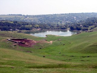 satul hiliuti din raionul riscani